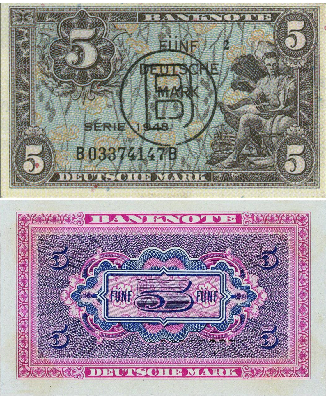 5 DM Geldschein (Serie 1) mit Berlin-Stempel, - (Serie I BdL )